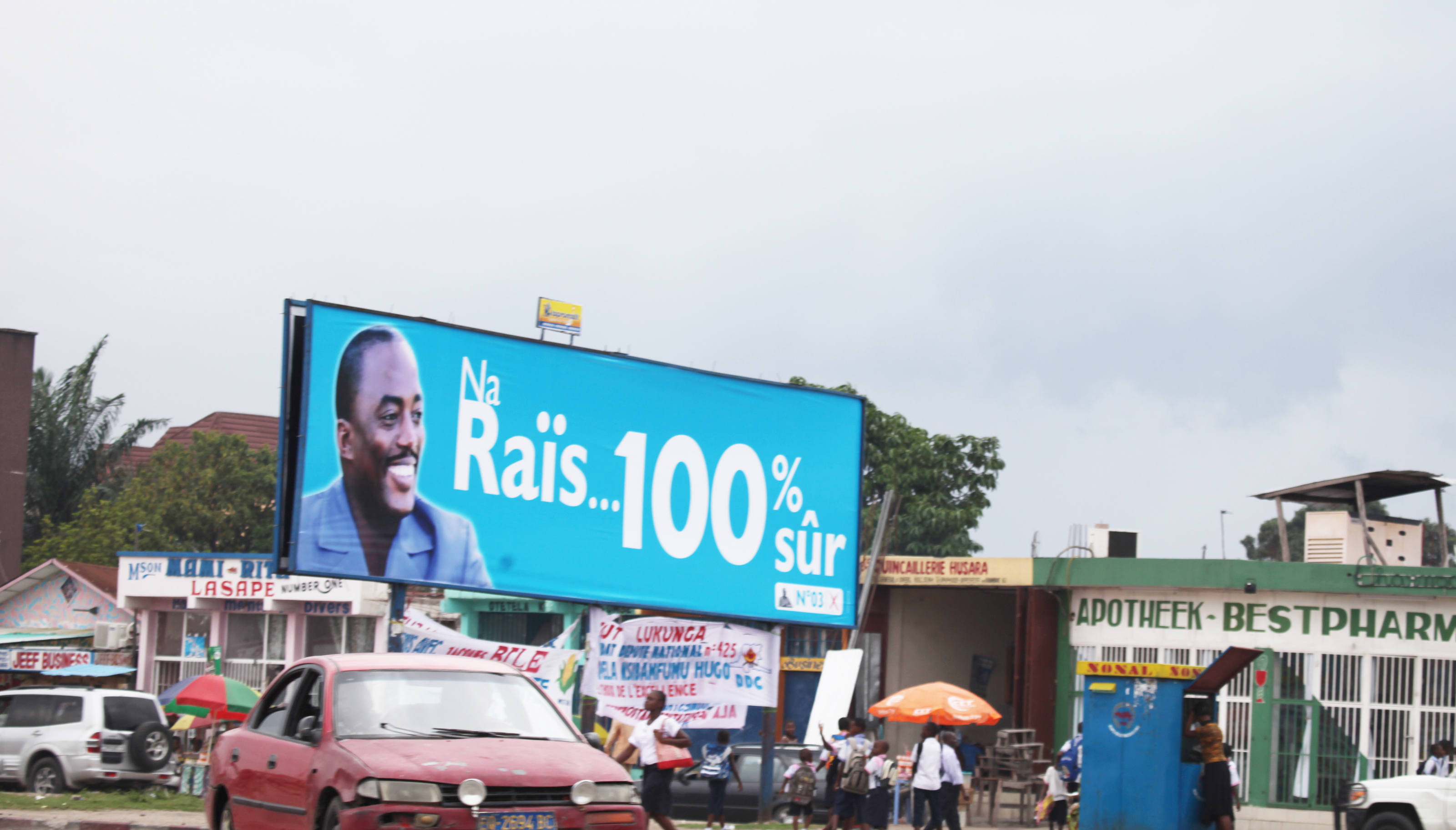 2011_11_01_Début timide de la Campagne électorale Kinshasa. © MONUSCO/Myriam Asmani La campagne électoral à débuter officiellement le le 28 octobre et s’achèvera le 26 novembre 2011.